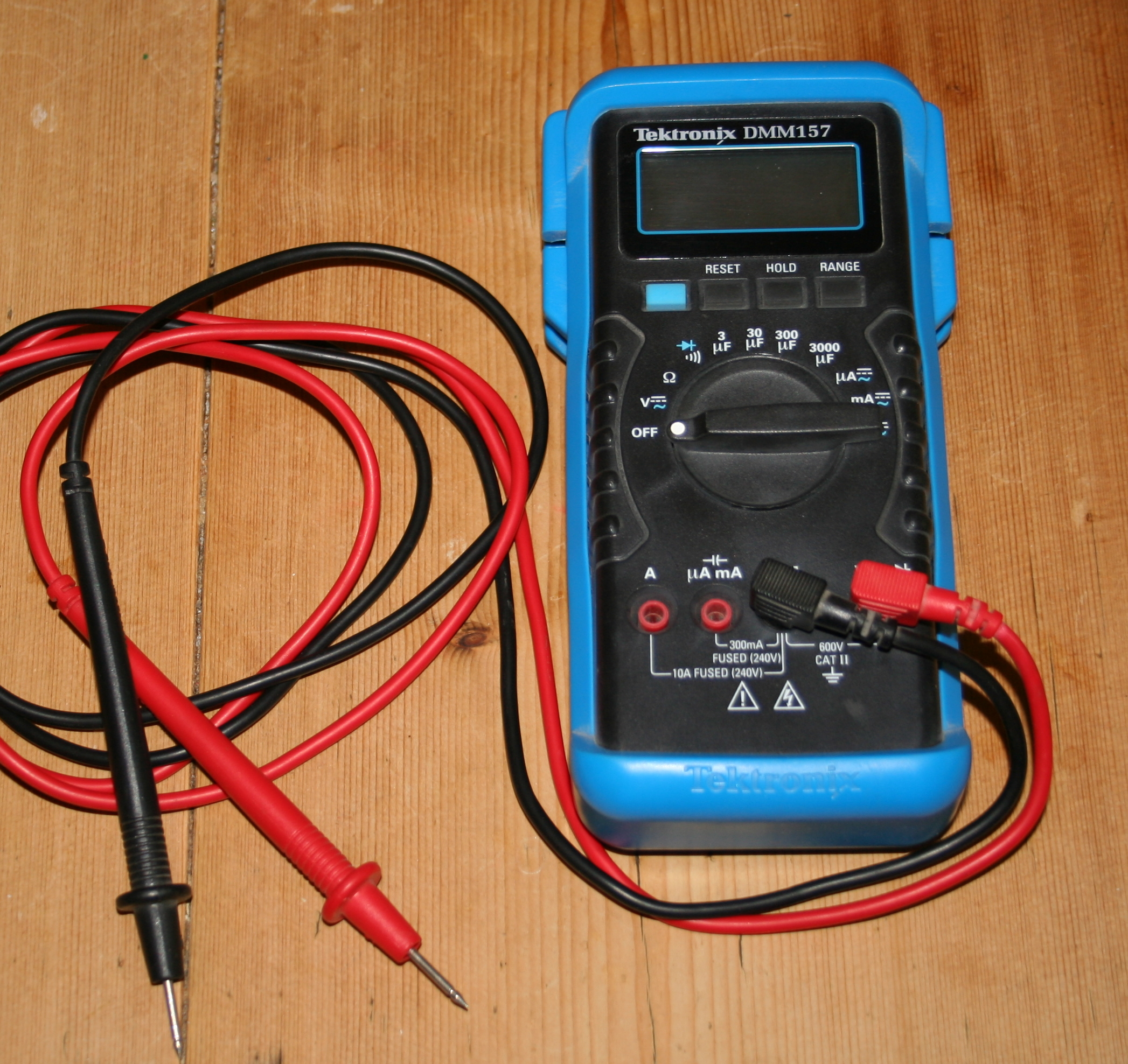 My Tektronix DMM157 Digital MultiMeter.